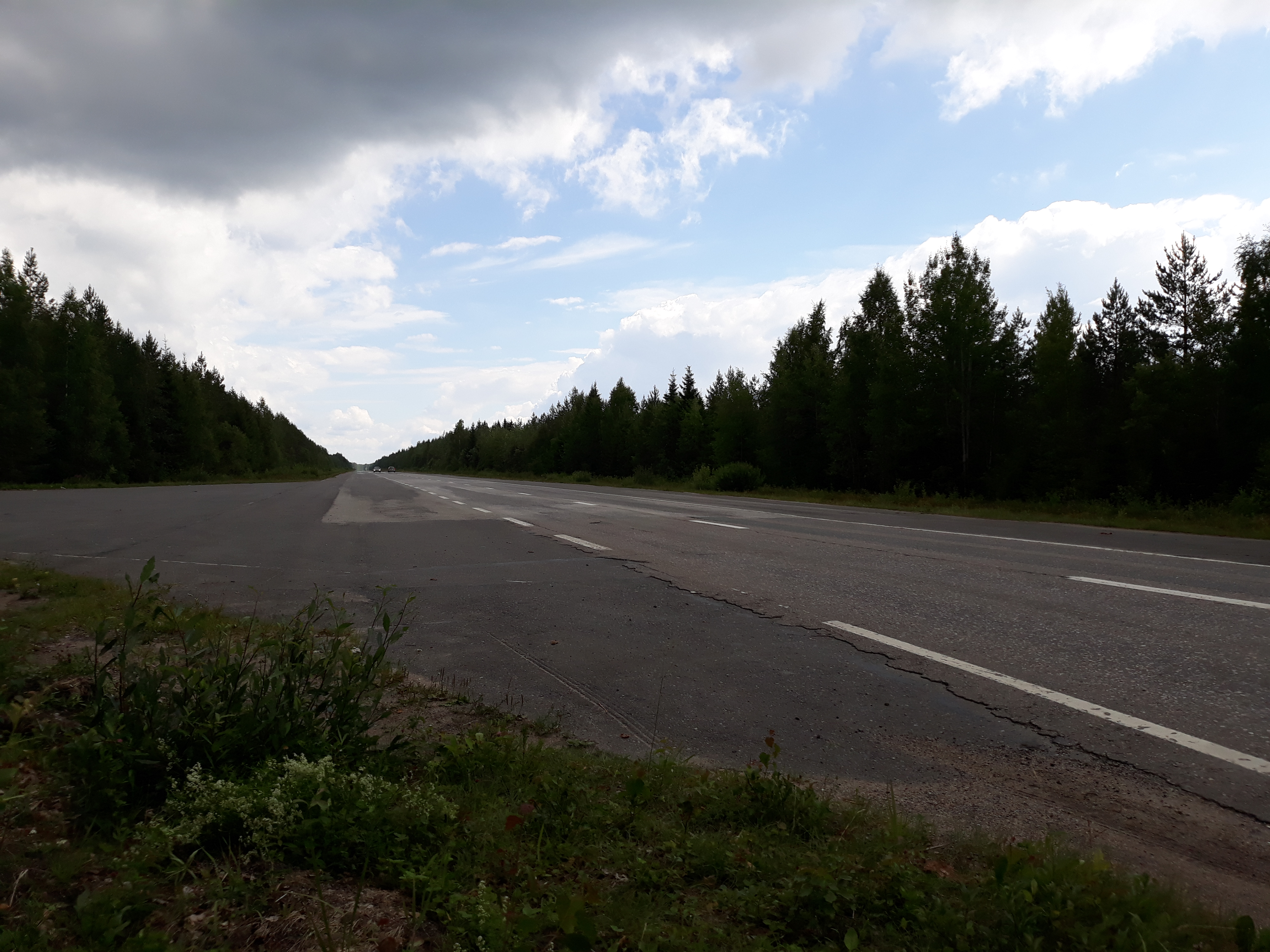 Tervon varalaskupaikka Tervossa seututiellä 551.